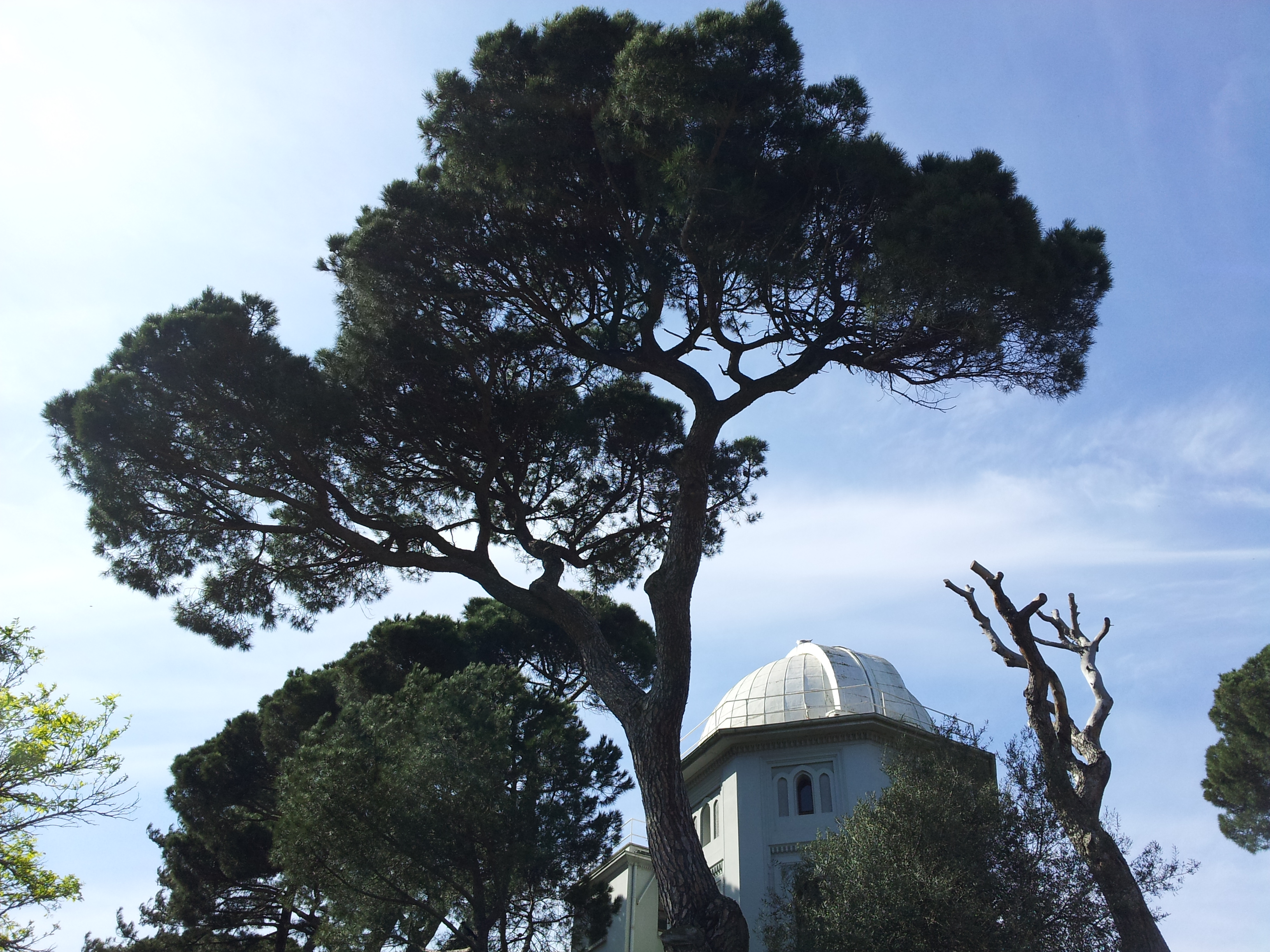 Kandilli Observatory